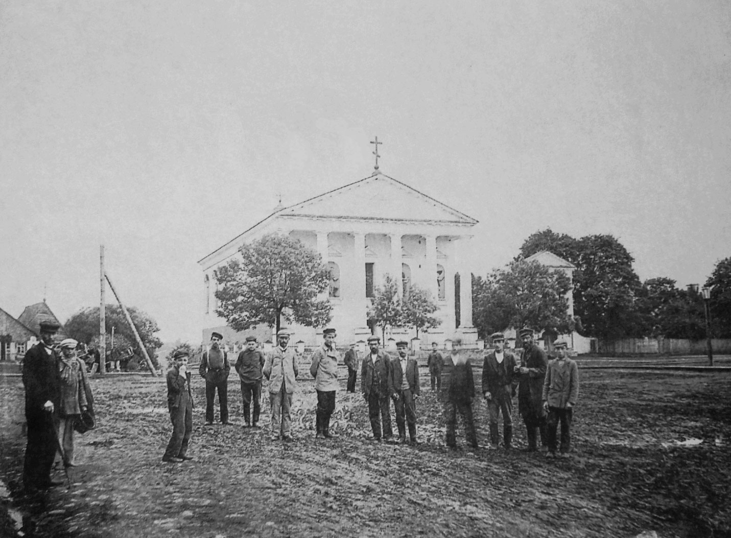 Беларуская (тарашкевіца): Валожын (Vałožyn), пляц Рынак (plac Rynak). Касьцёл Сьвятога Язэпа па перабудове пад царкву Маскоўскага патрыярхату